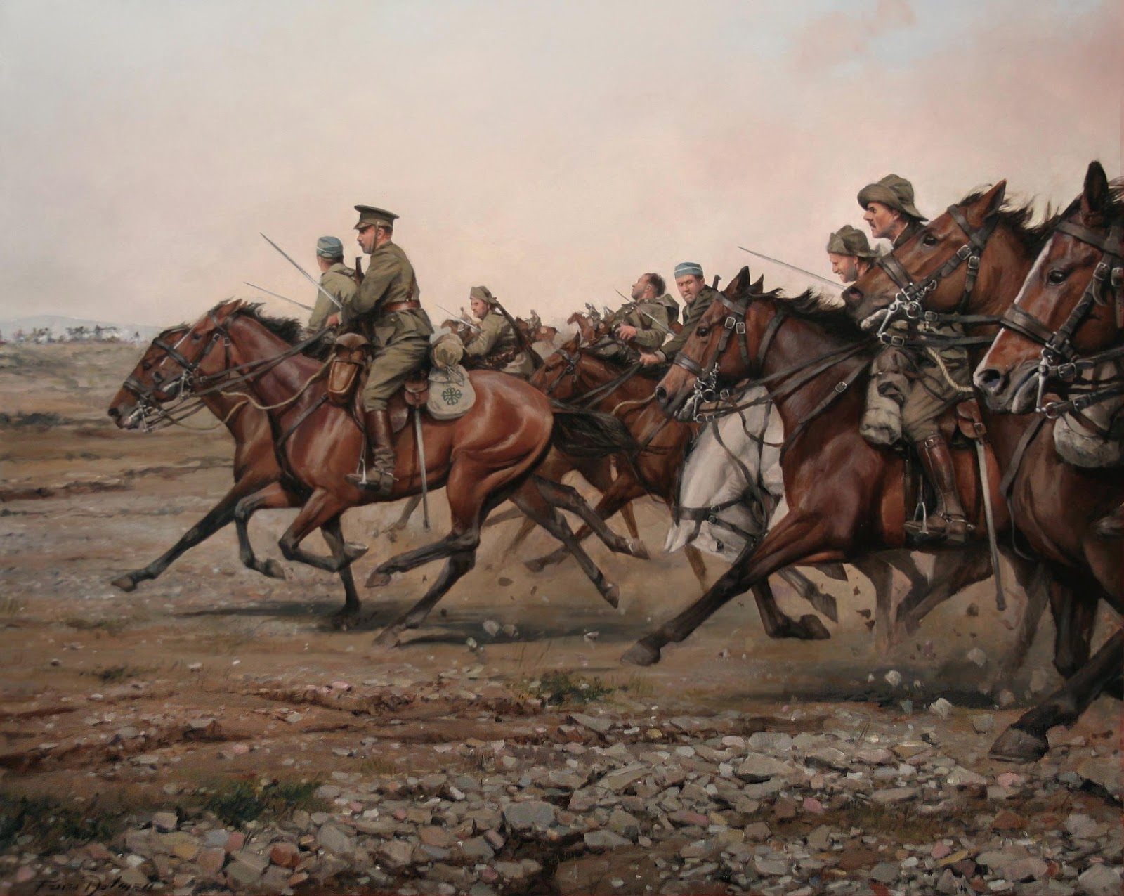 Carga del río Igan del Regimiento Cazadores de Alcántara 14º de Caballería en 1921, durante la Guerra del Rif.